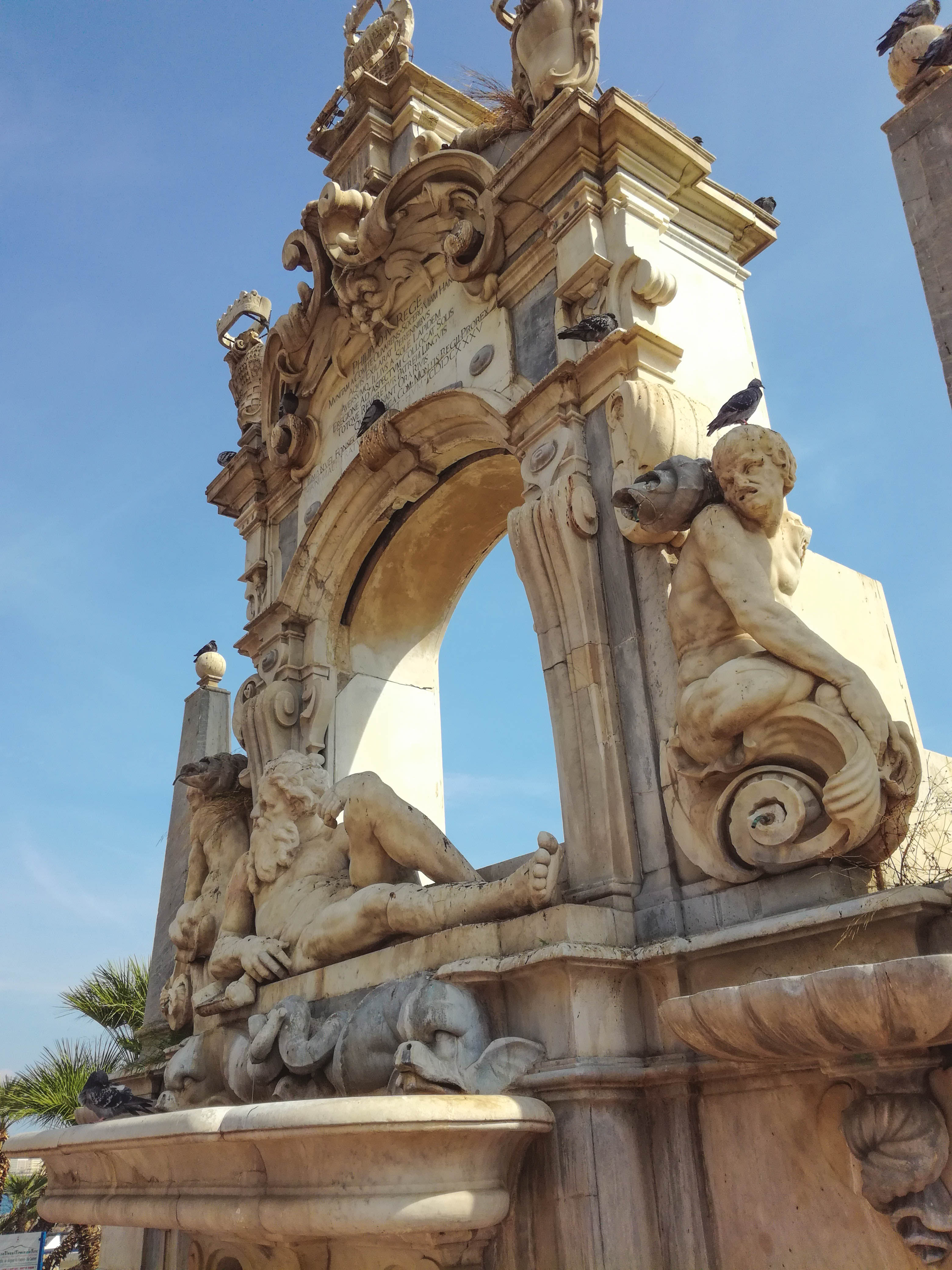 Fontana del Sebeto, Napoli